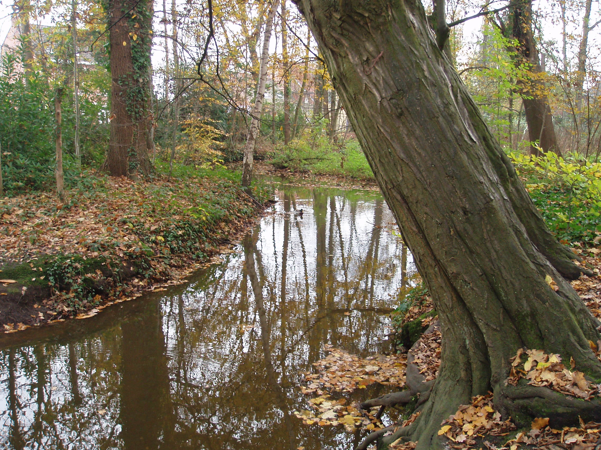 "Lopende beek" domein de Renesse